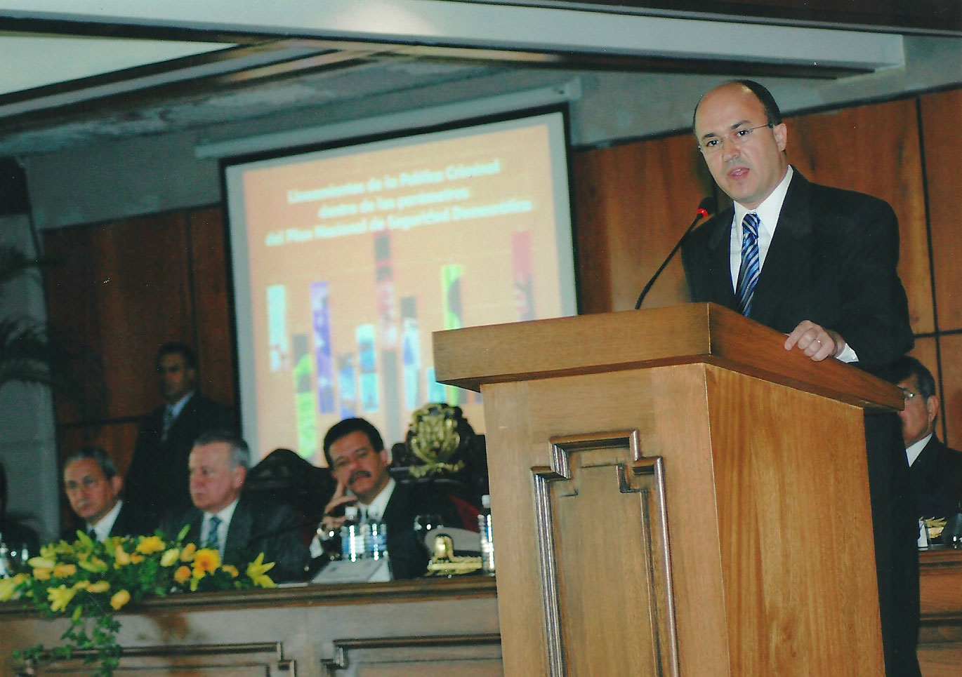 Francisco Domínguez Brito en la inauguración del Palacio de Justicia de Santo Domingo, 5 de enero de 2005.